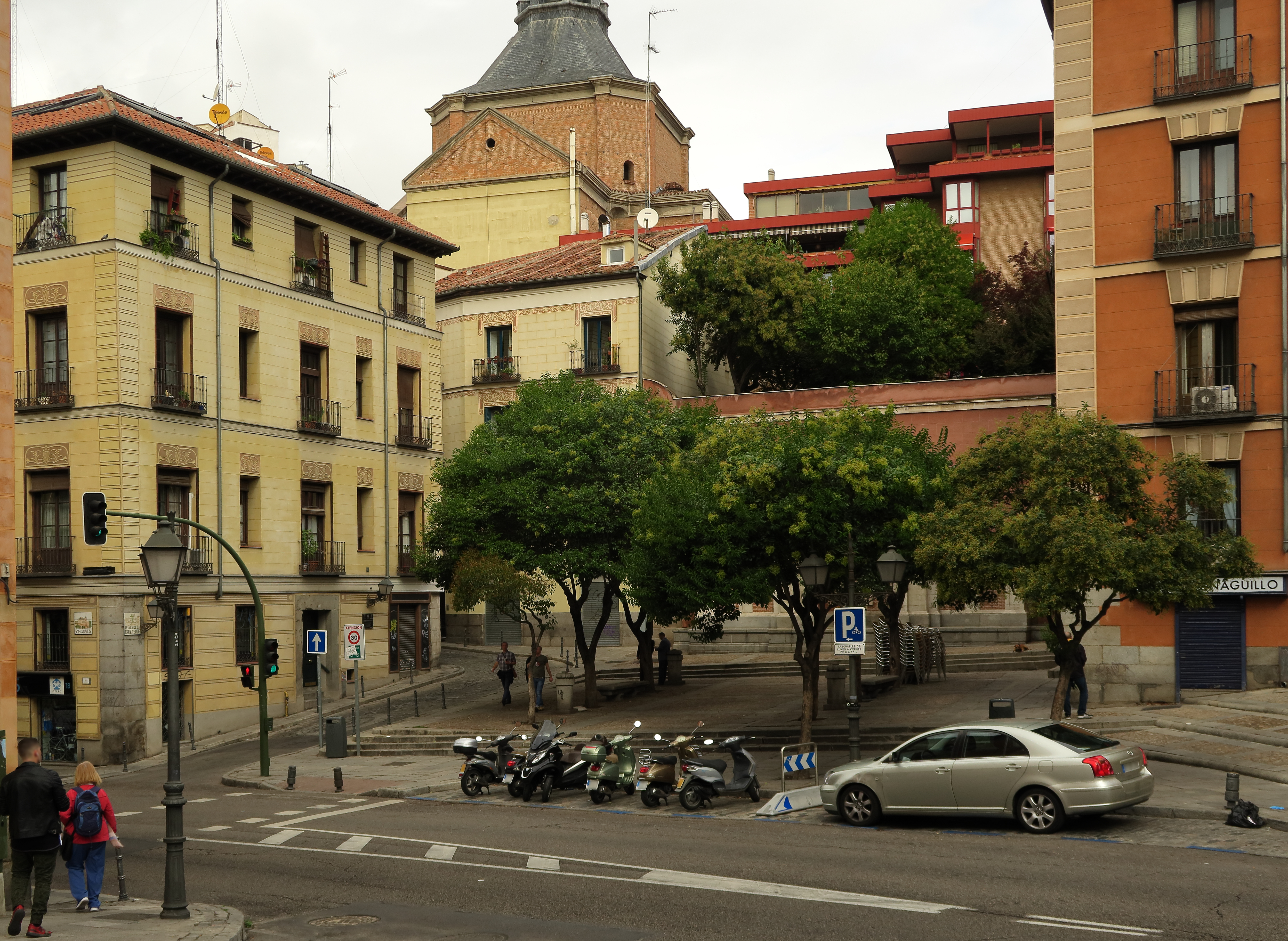 Plaza de la Cruz Verde, desde Costanilla de San Andrés